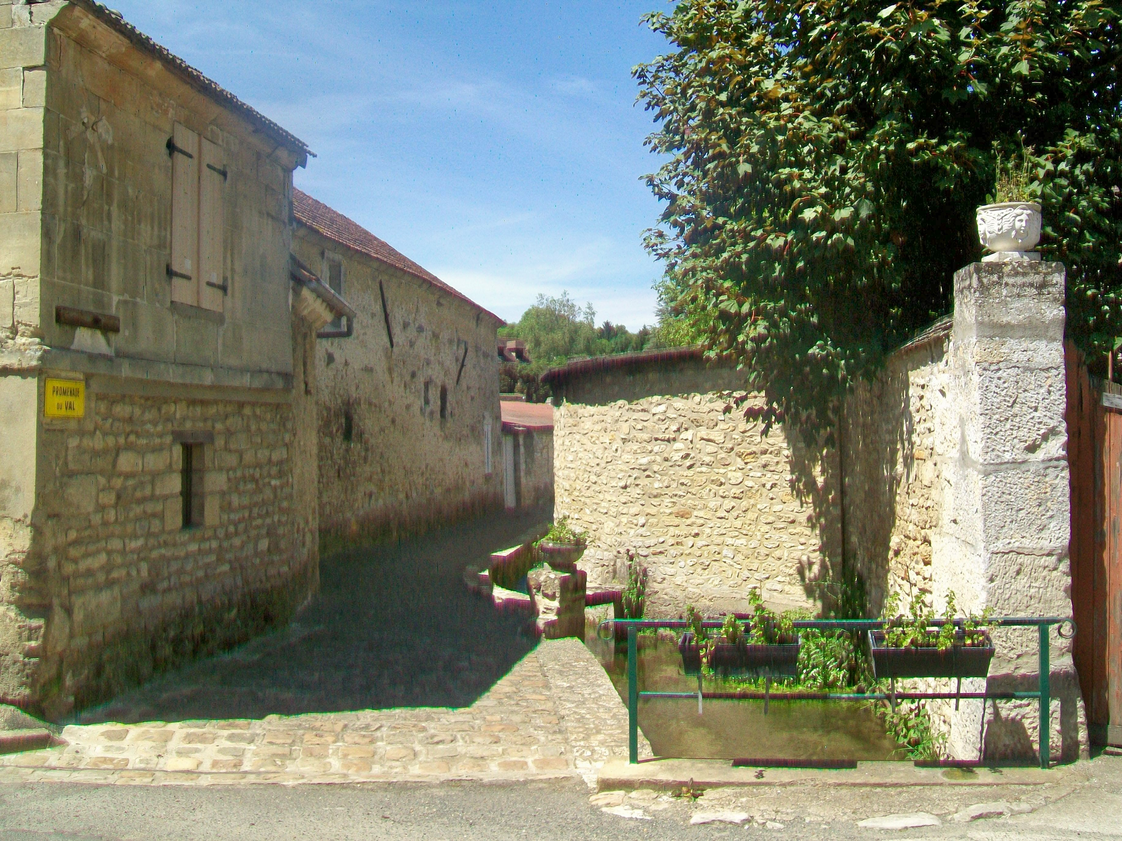 La promenade du Val, vue depuis la rue de la croix Chevrier.